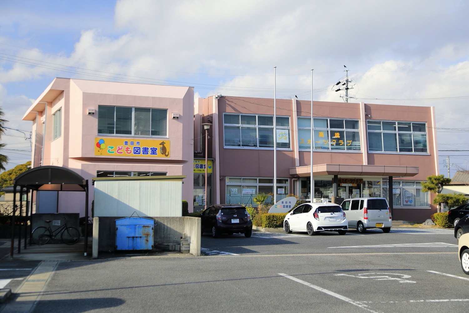 豊田市こども図書室（豊田市高橋町、2019年（平成31年）3月）